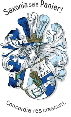 Studentenwappen des Corps Saxonia Göttingen